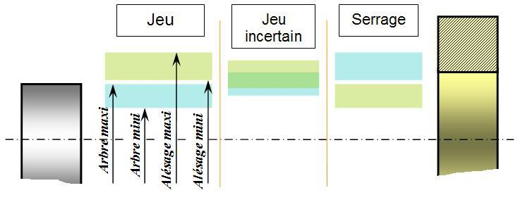 schéma personnel.